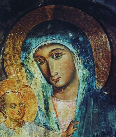 Immagine miracolosa di Santa Maria del Castello